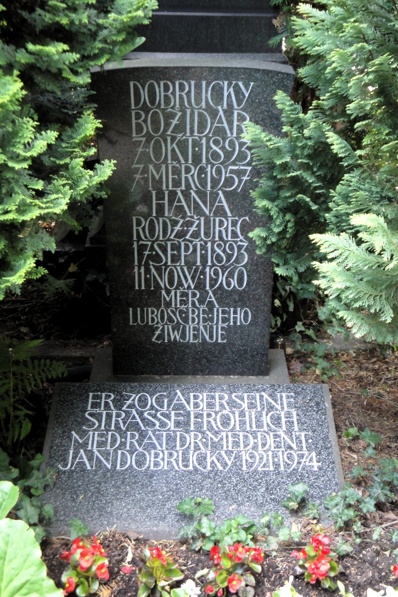 Hornjoserbsce: Row Božidara Dobruckeho na Tuchorskim kěrchowje w Budyšinje.